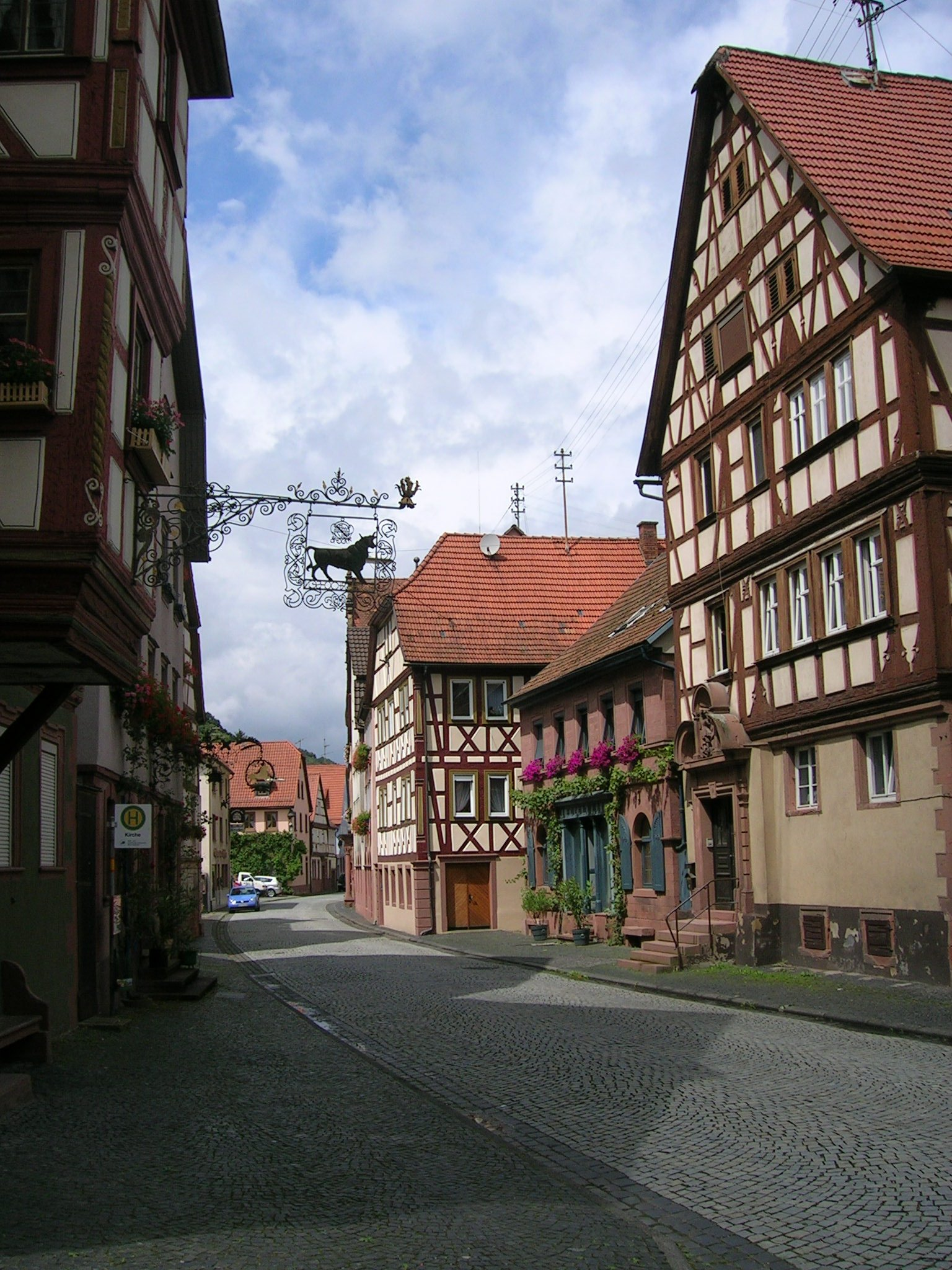 Hauptstraße von Rothenfels nach Eröffnung der Umgehungsstraße